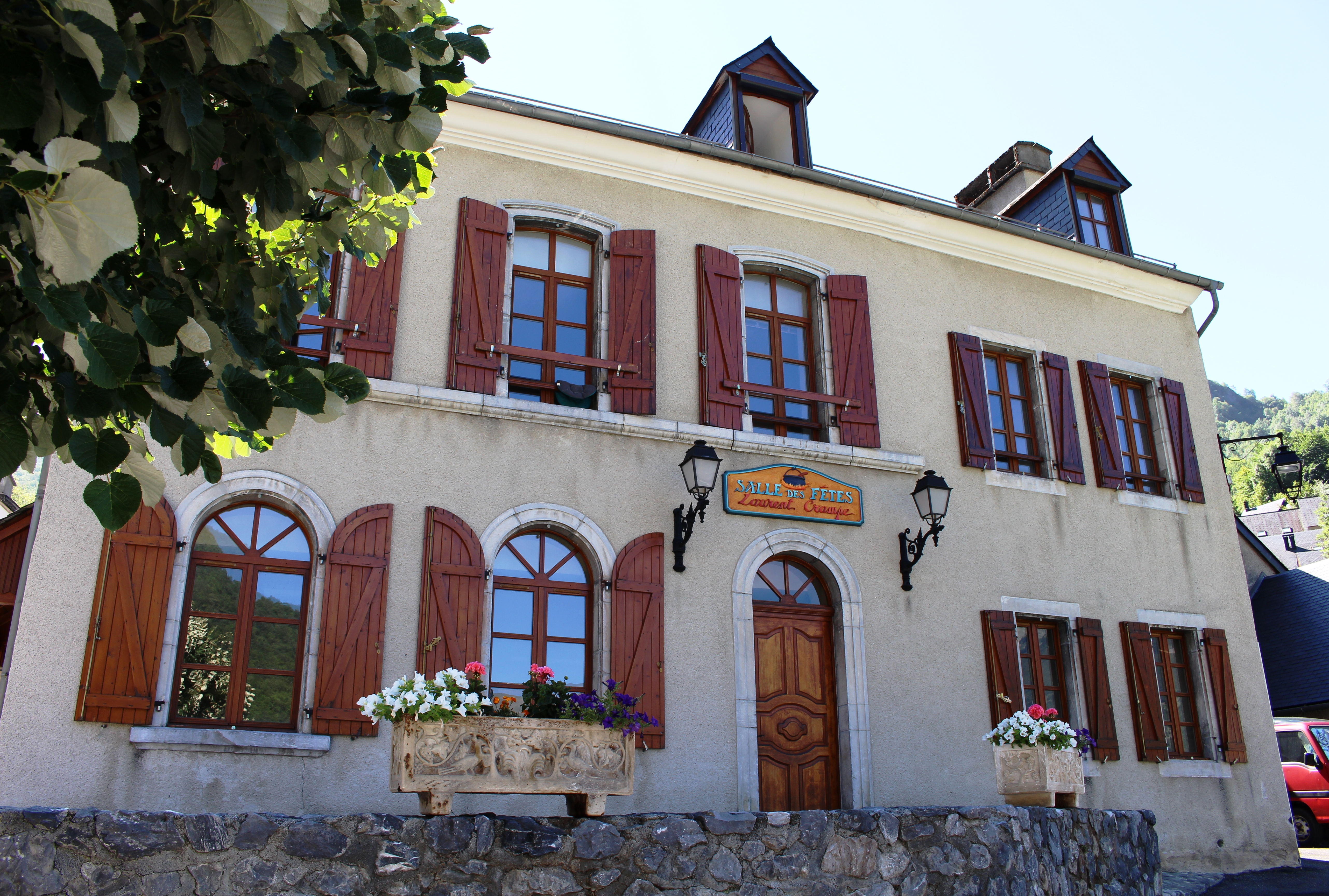 Salle des fêtes de Viella (Hautes-Pyrénées)